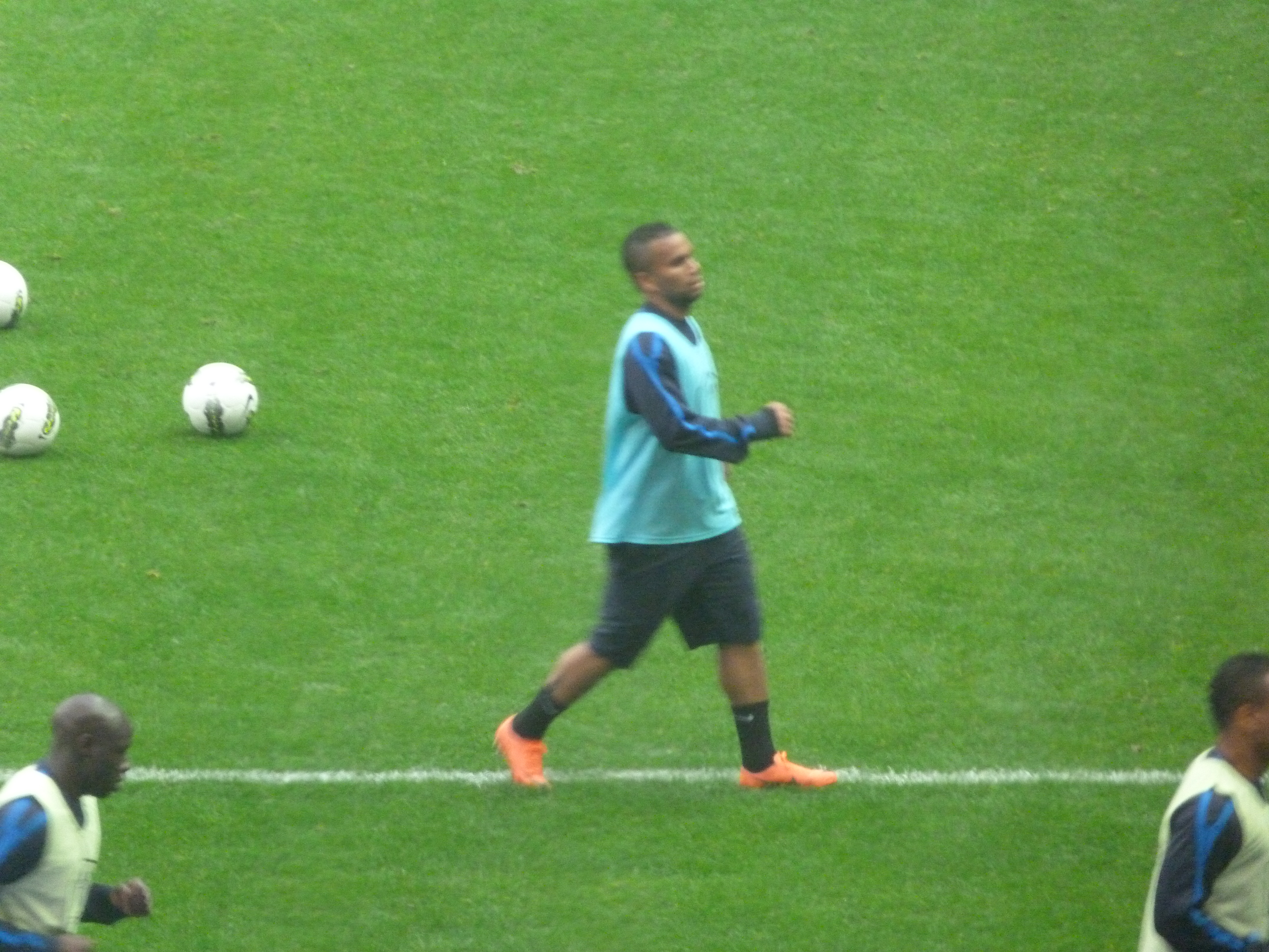 Anthony Laup s'échauffant juste avant la final de la Coupe de France opposant Quevilly à Lyon.